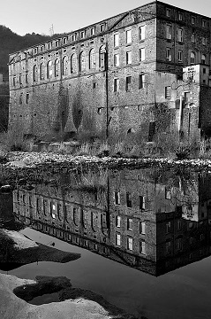 Ancien Moulinage de fil de vers à soie en Ardèche, Le Moulinon, Saint Sauveur de Montagut